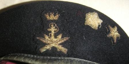 basco militare in uso ai lagunari presso la ex scuola truppe corazzate e meccanizzate di Caserta